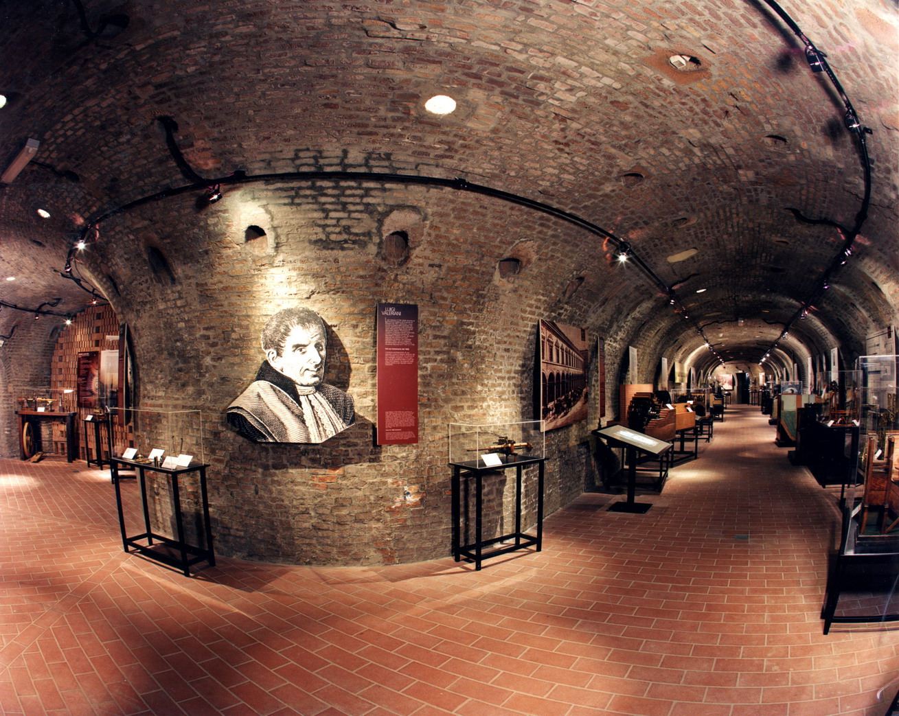 Sezione all'interno del forno Hoffmann del Museo del Patrimonio Industriale dedicata all'istruzione tecnica e all'Istituzione Aldini-Valeriani